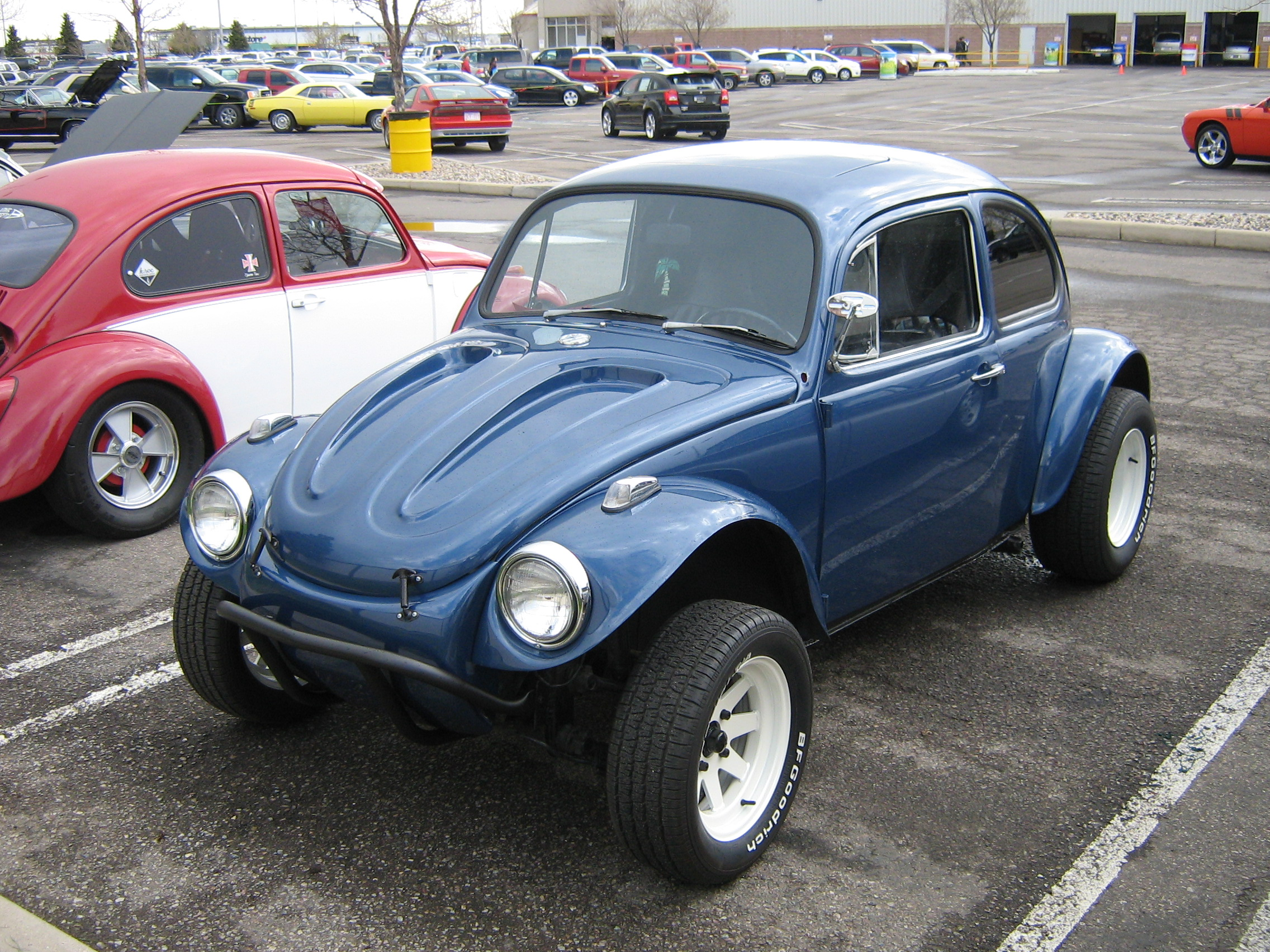 1968 Volkswagen Beetle Baja